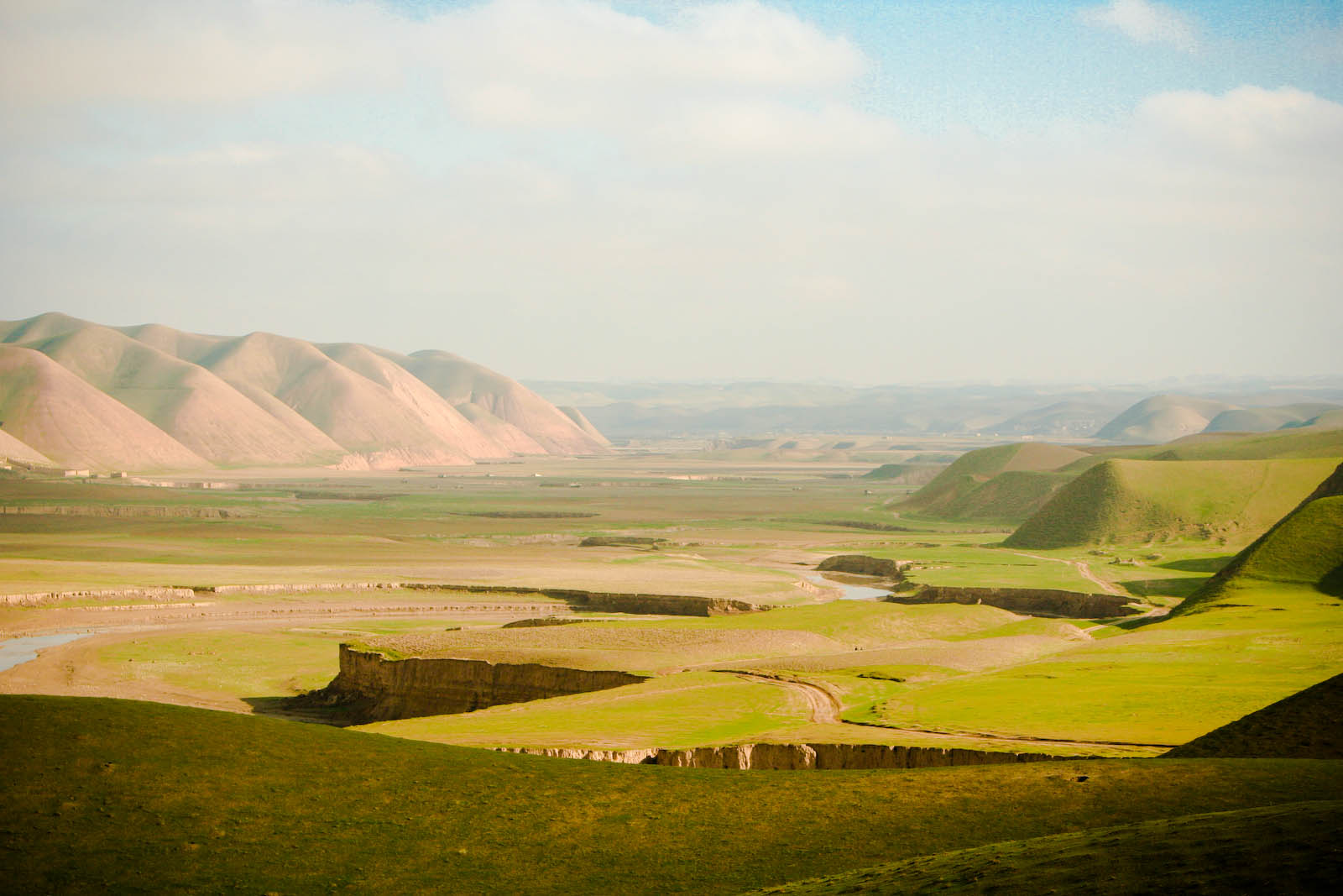 ファーリヤーブ州の山と川